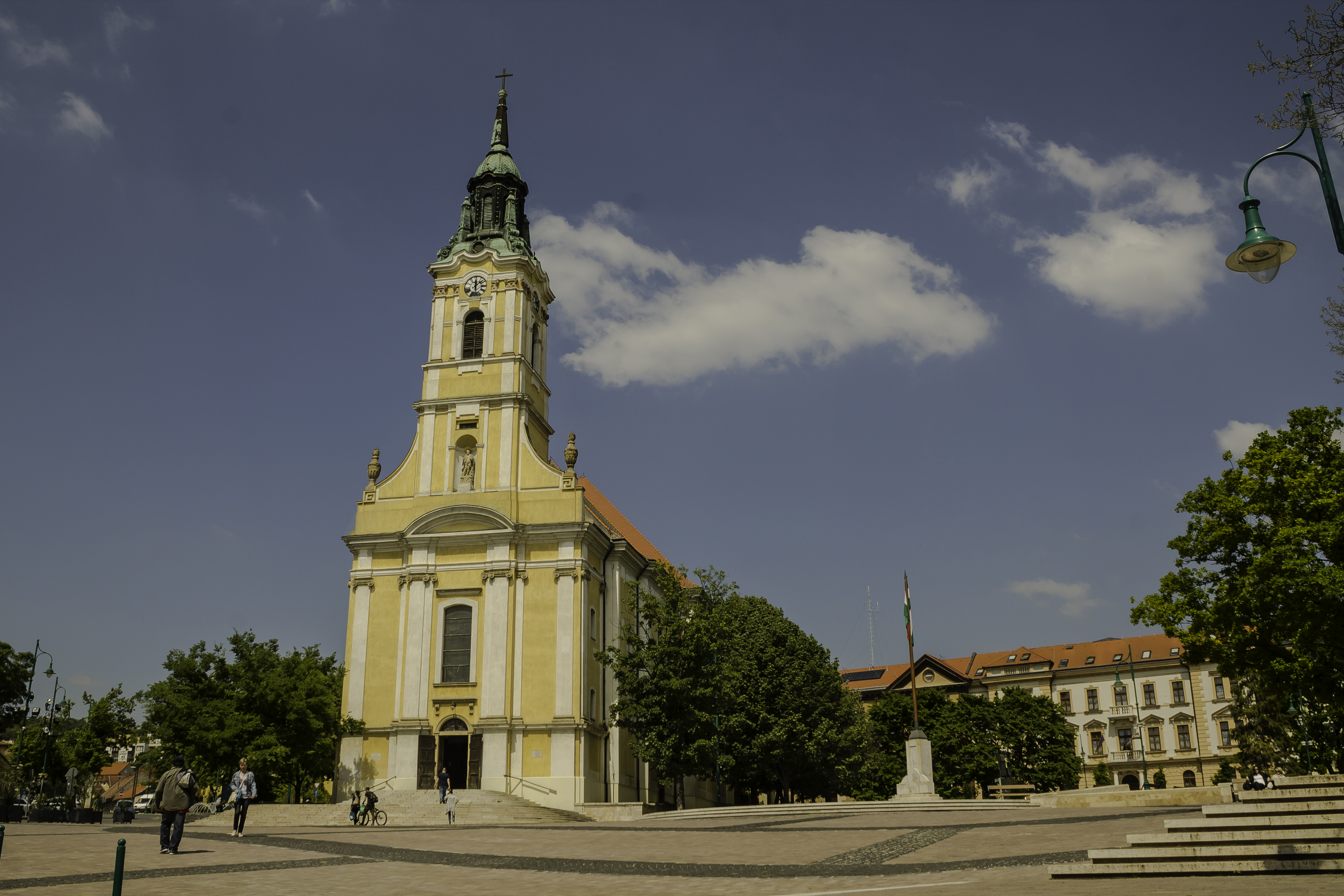 R. k. plébániatemplom (Krisztus Mennybemenetele), Béla király tér (Szekszárd)